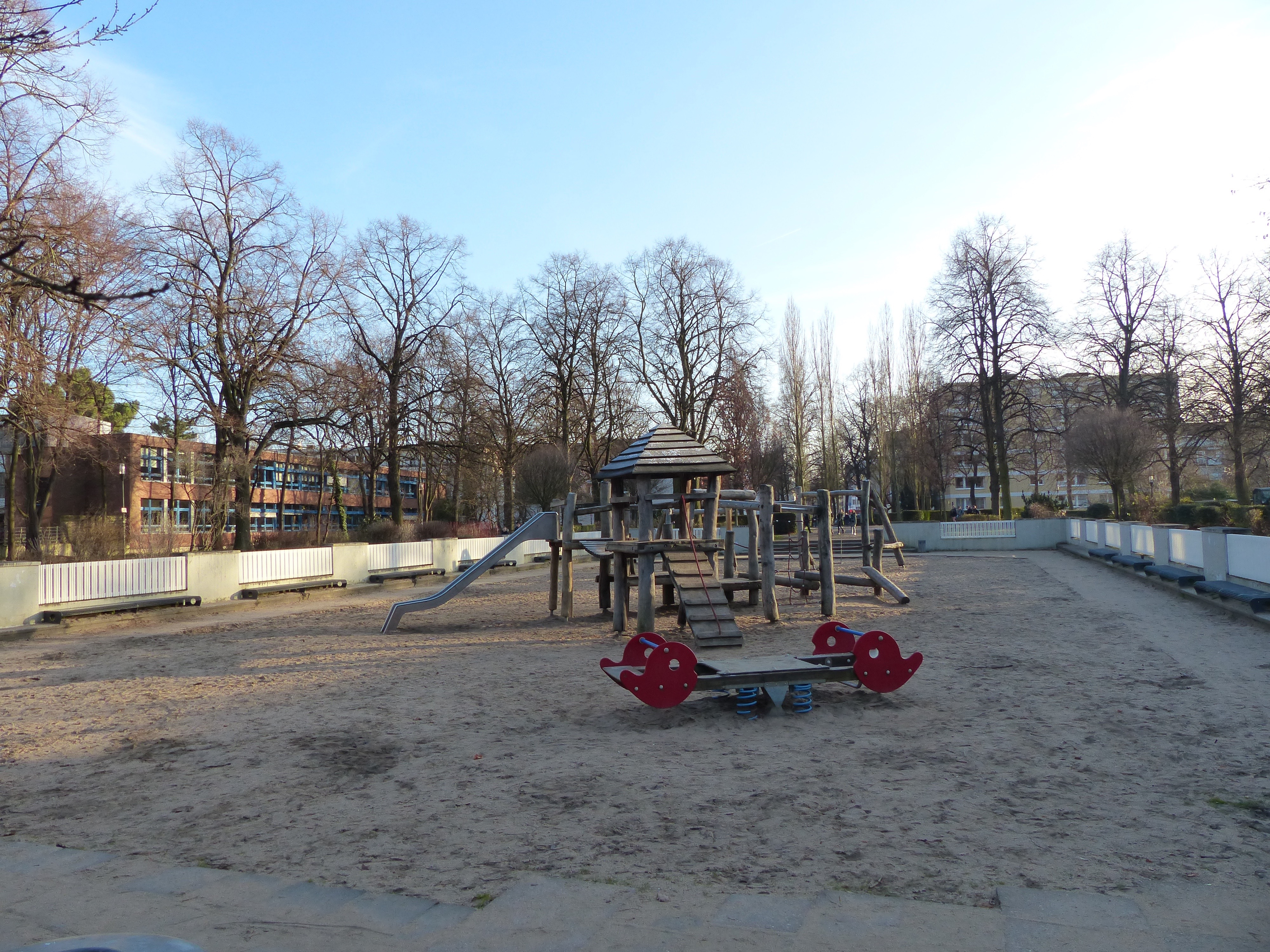 Köln-Lindenthal: Karl-Schwering-Platz - Spielplatz